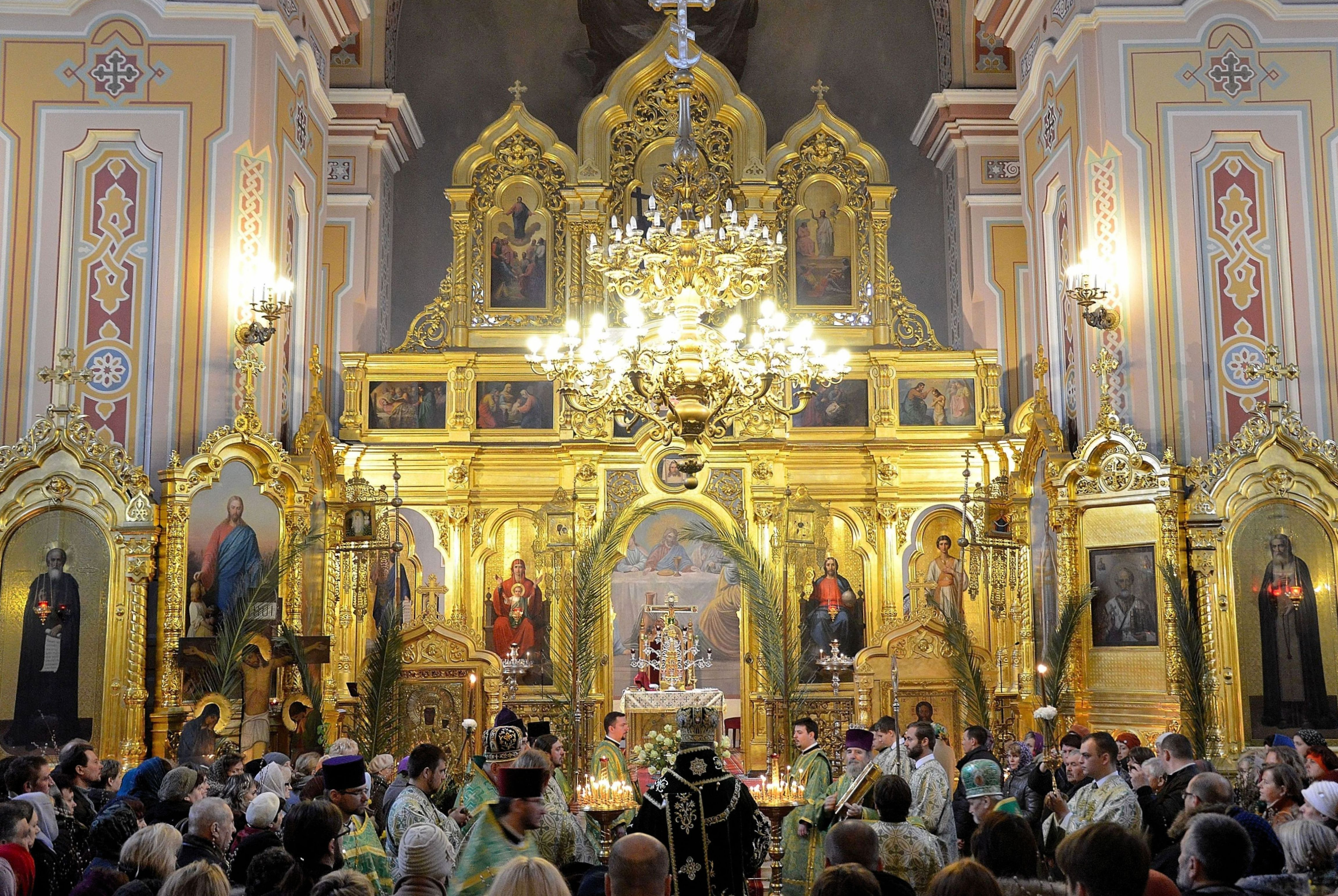 Nabożeństwo w Niedzielę Palmową w prawosławnym soborze metropolitarnym św. Marii Magdaleny w Warszawie